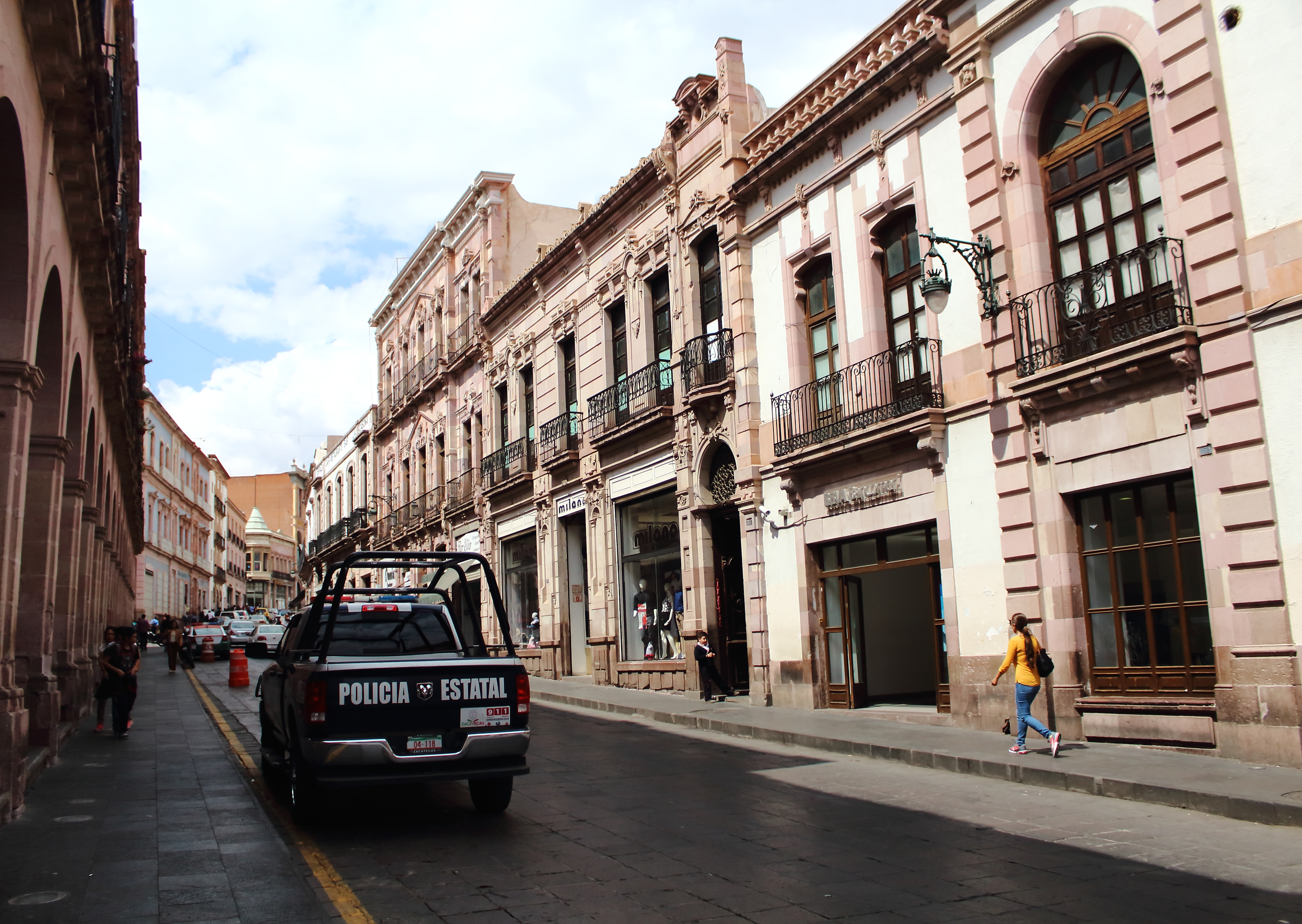 Avenida Hidalgo, Zacatecas.